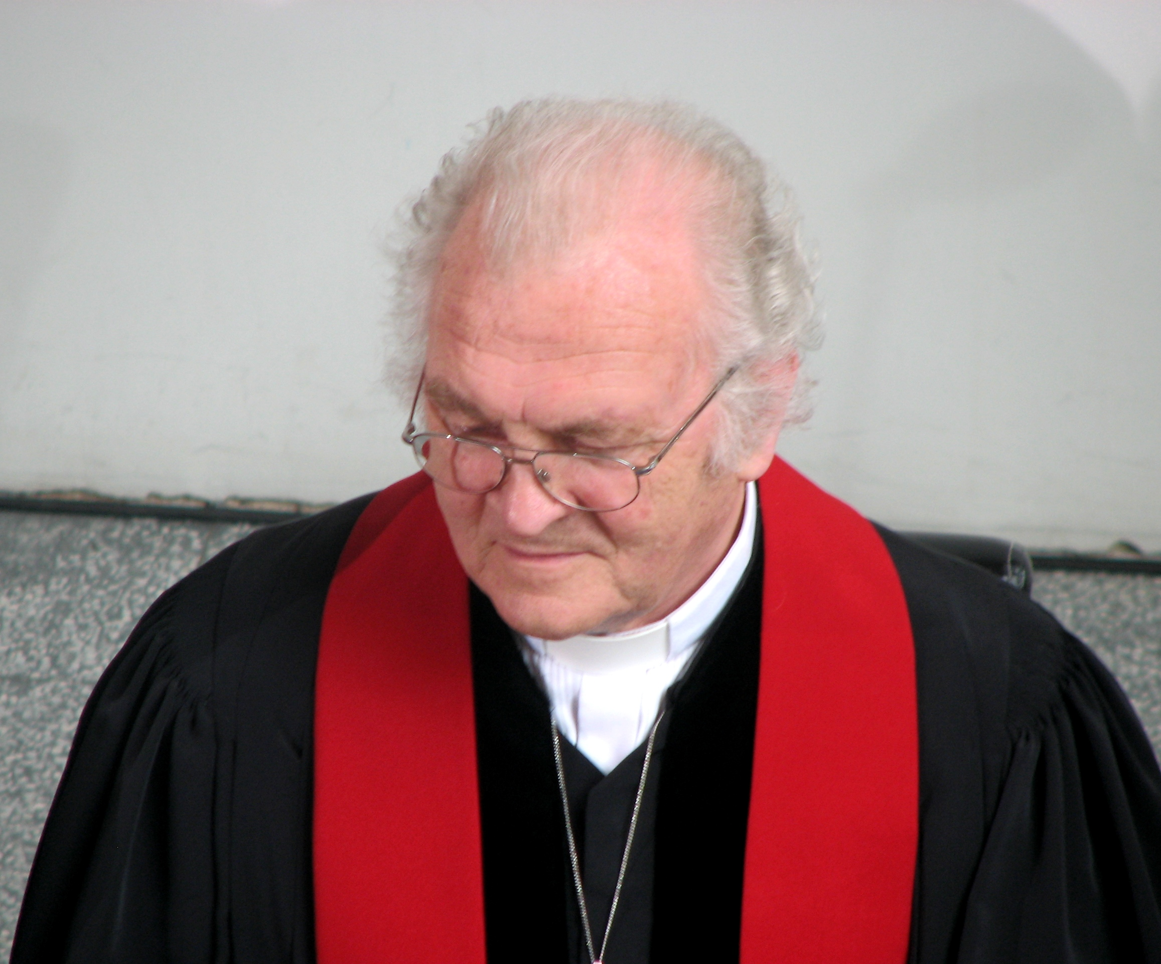 Olav Pärnamets oikumeenilisel jumalateenistusel Harkujärve Stefanose Kirikus